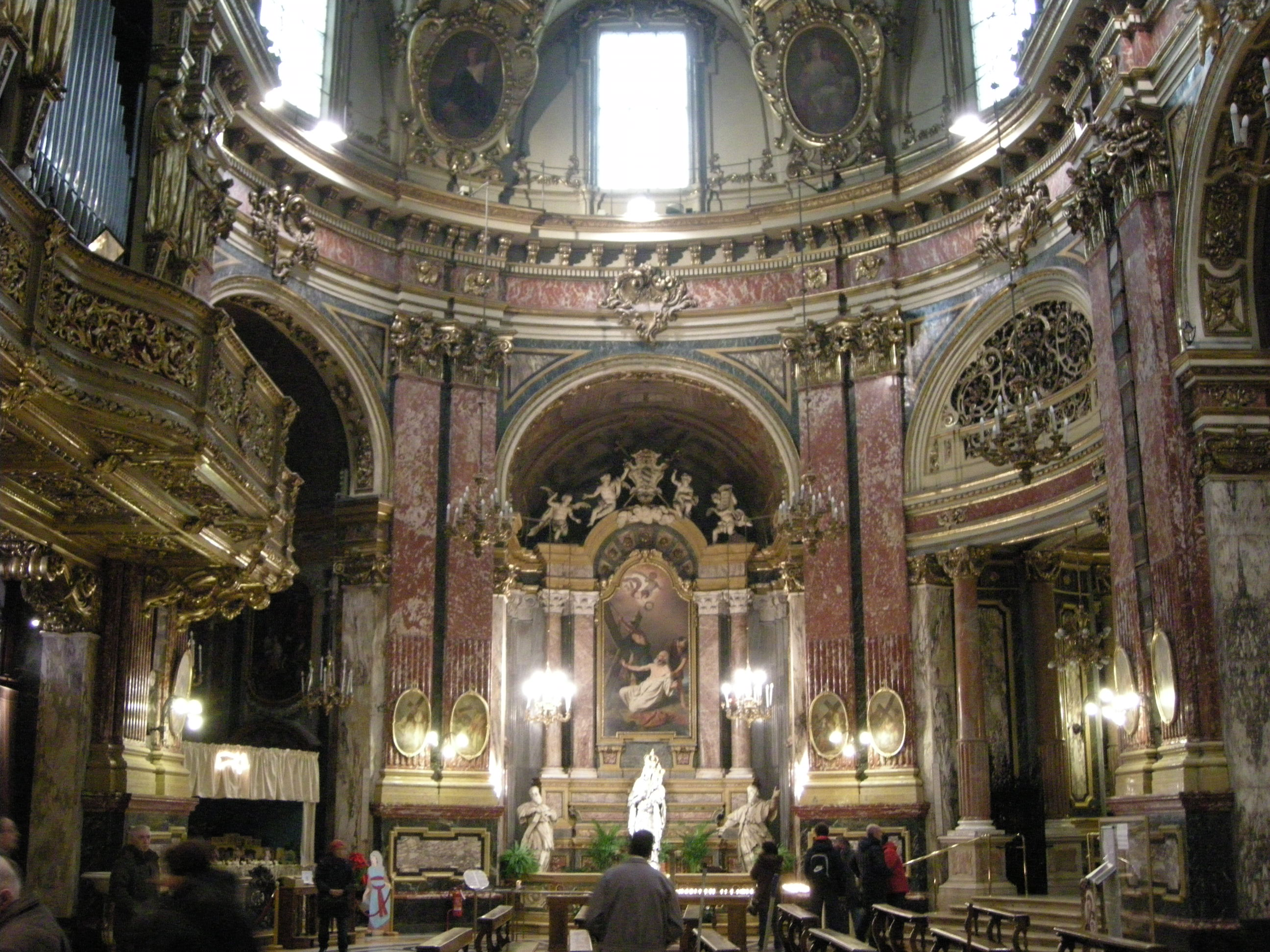 Consolata di torino, interno